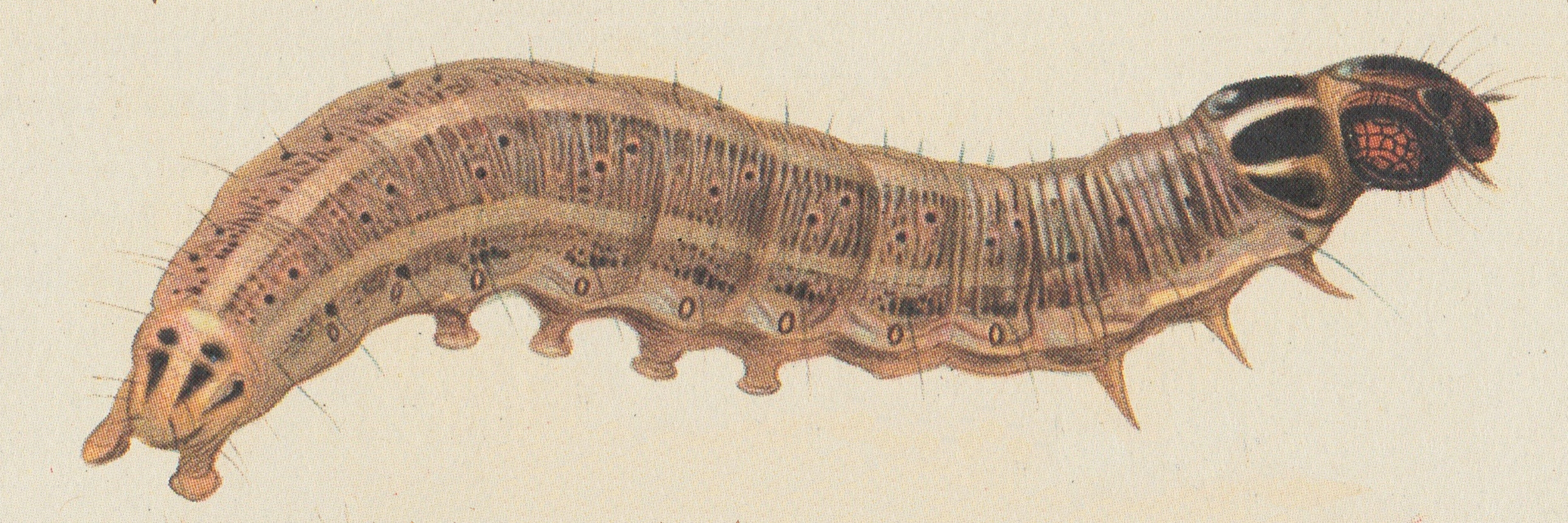 Apamea sordens (Hufnagel, 1766)